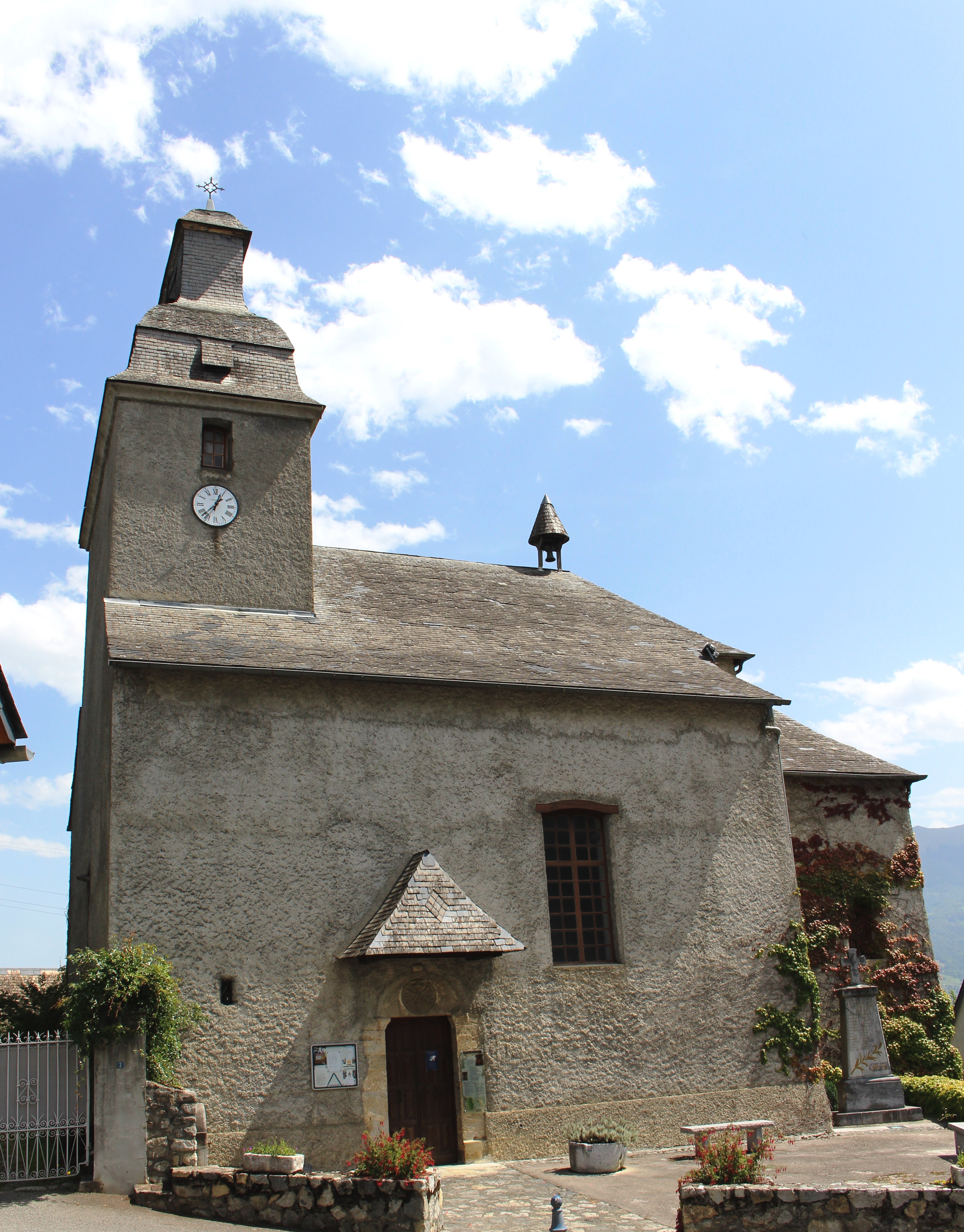 Église Saint-Martin d'Arcizans-Avant (Hautes-Pyrénées)